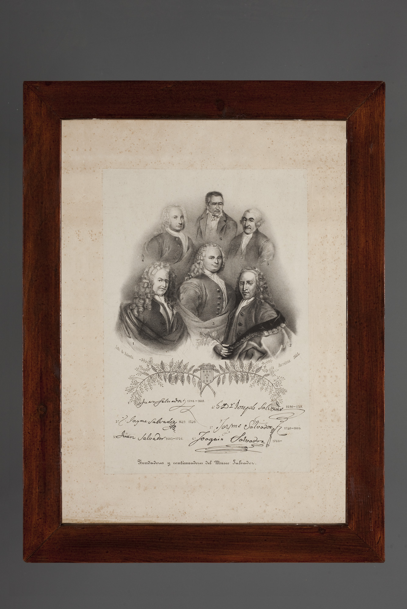 Gravat de la Familia Salvador, de Pierre André Pourret (1754-181).